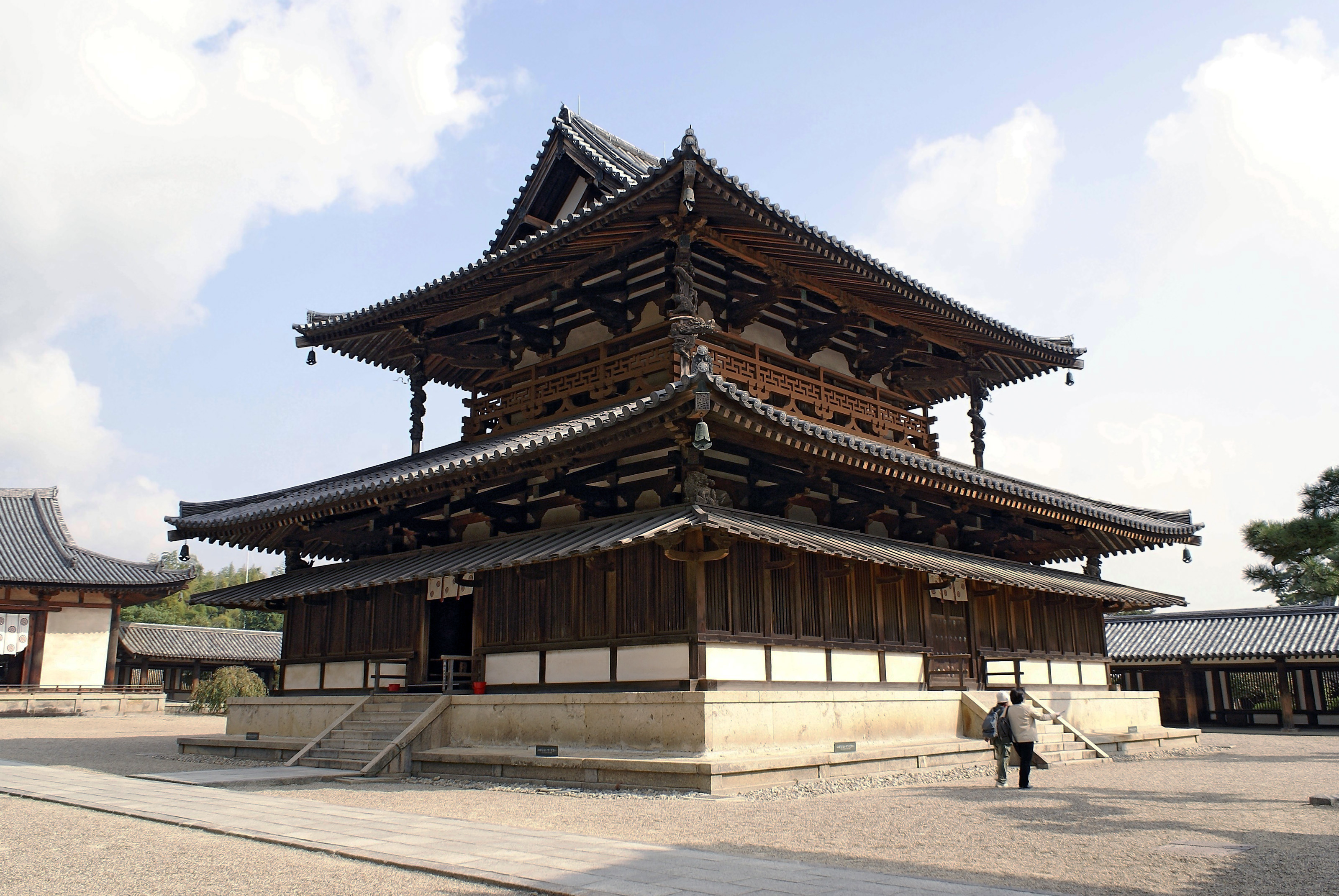 Horyu-ji in Ikaruga, Nara, Japan